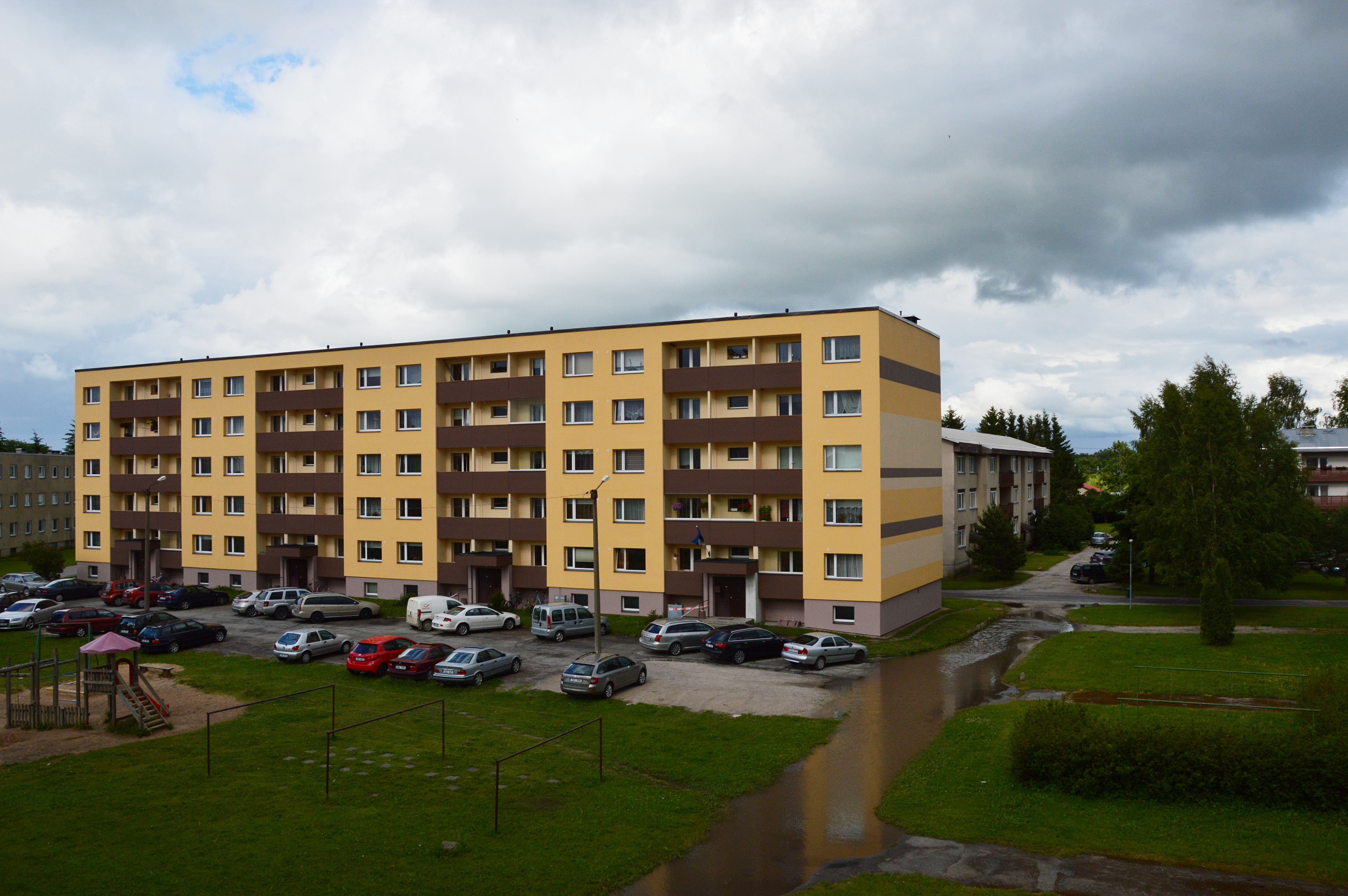 Vahtra tänava paneelelamu Kose alevikus.